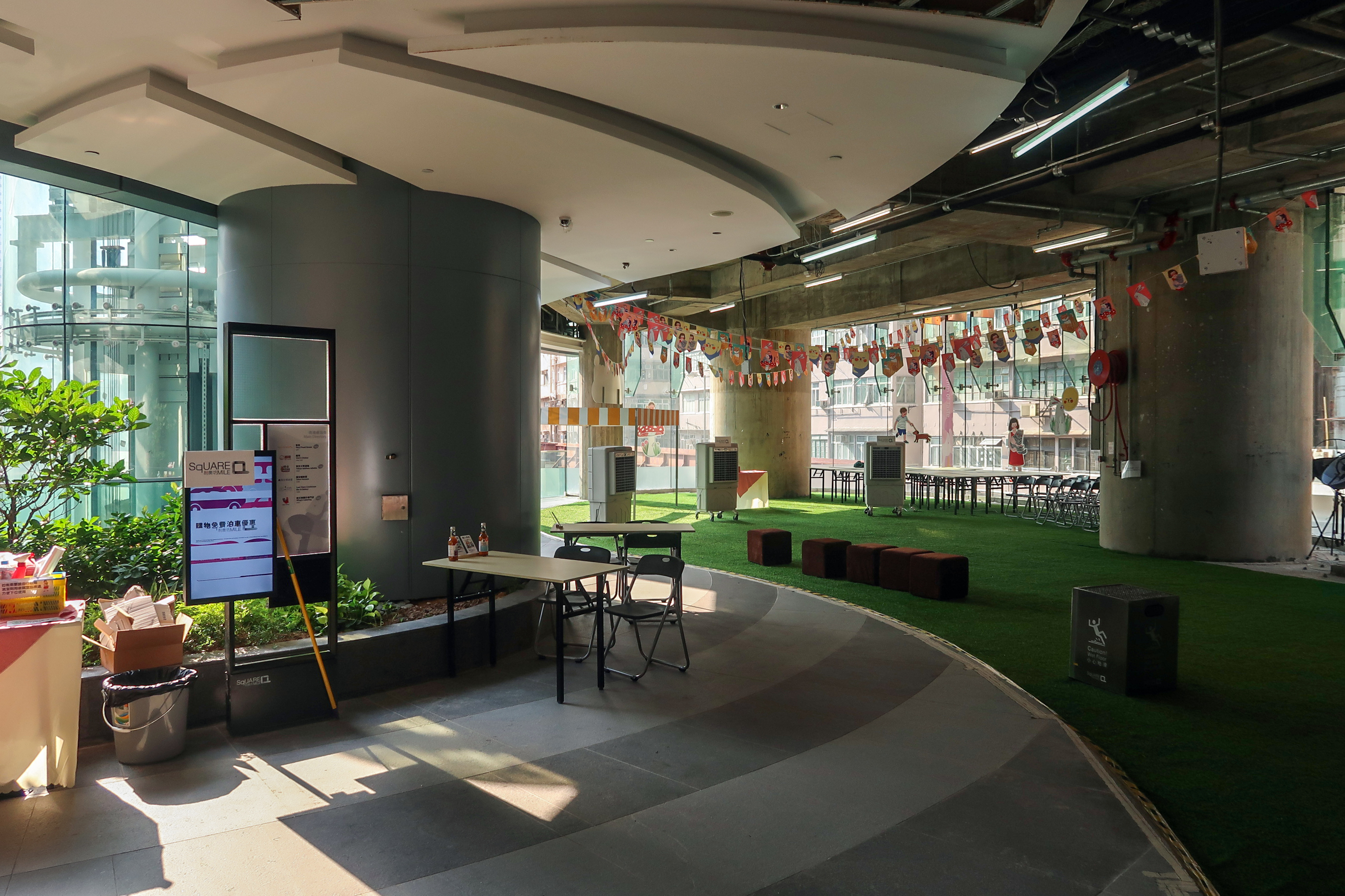 Square Mile Q L1